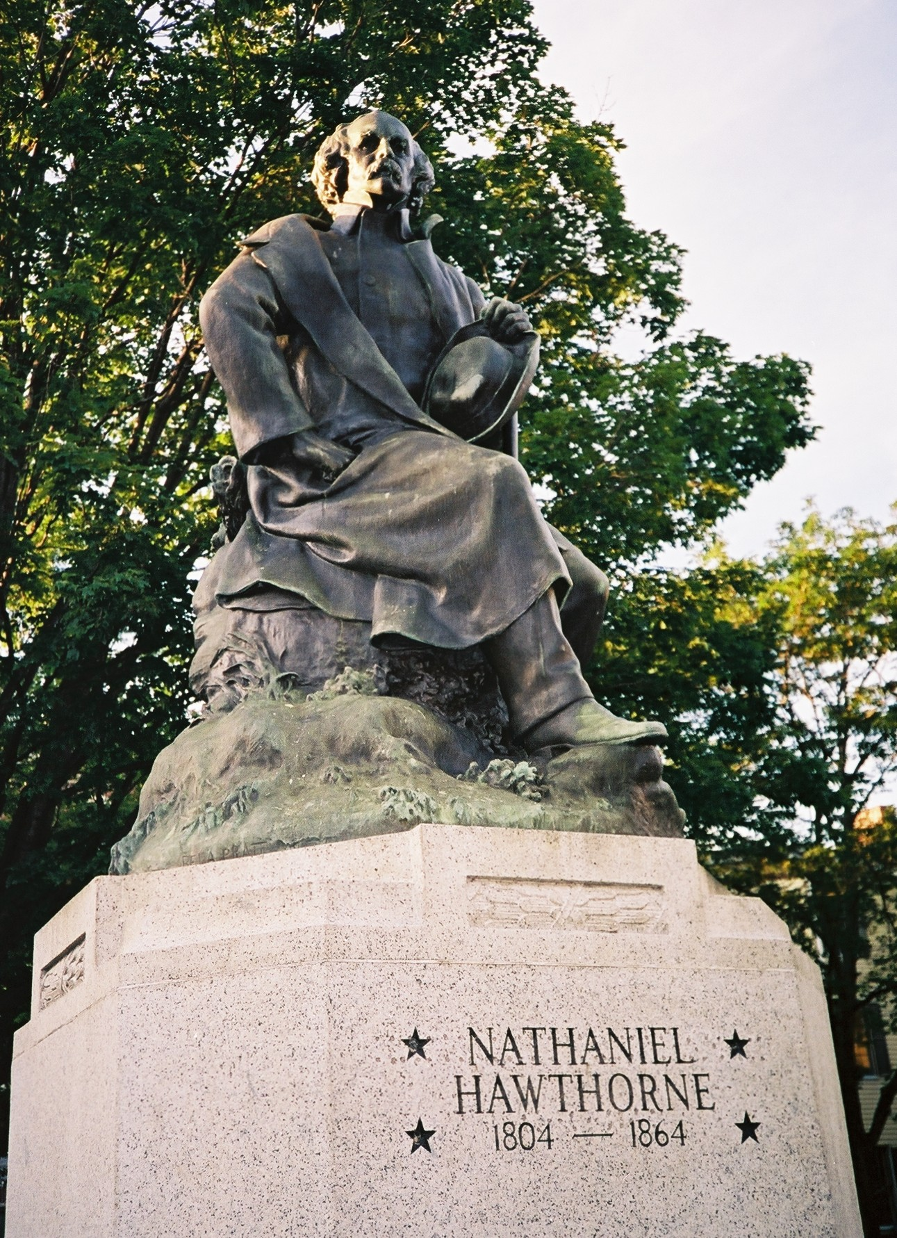 Auteur : Georgio Sujet : Statue de Nataniel Hawthorne Lieu : Salem, Massachusetts, USA Date juillet 2006